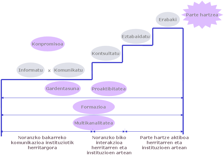 E-demokraziaren eboluzioaren eskailera.